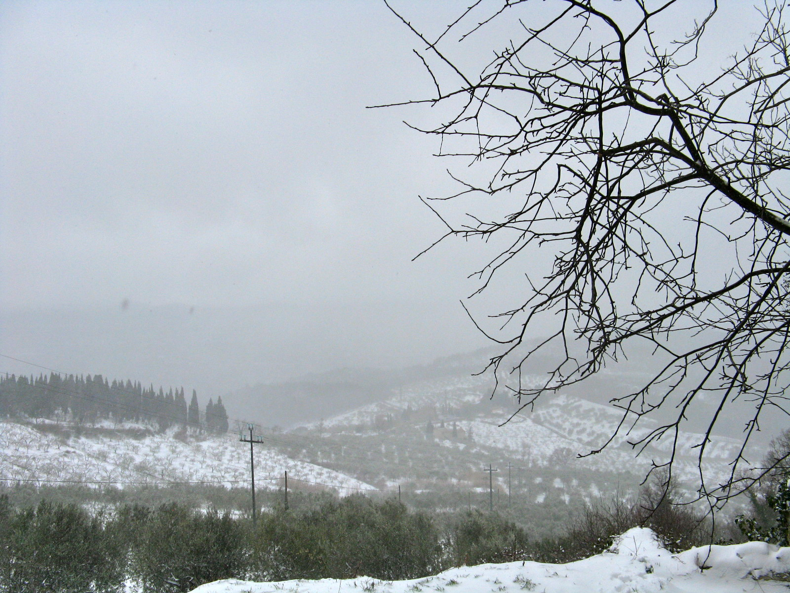 Veduta invernale dell'aera di Monte Morello, dal Rifugio Gualdo